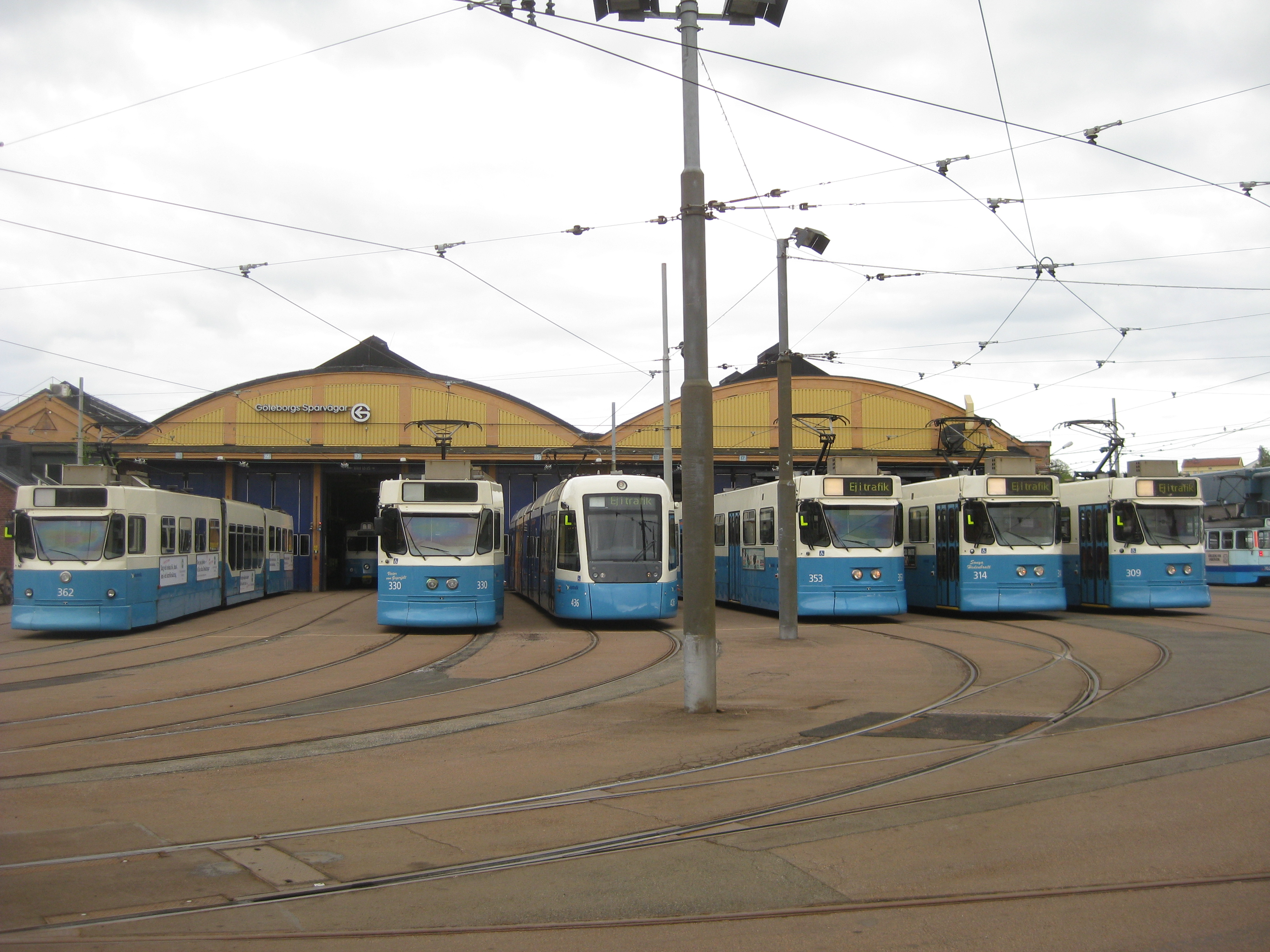 Spårvagnar på rad utanför Vagnhallen Majorna i Göteborg.